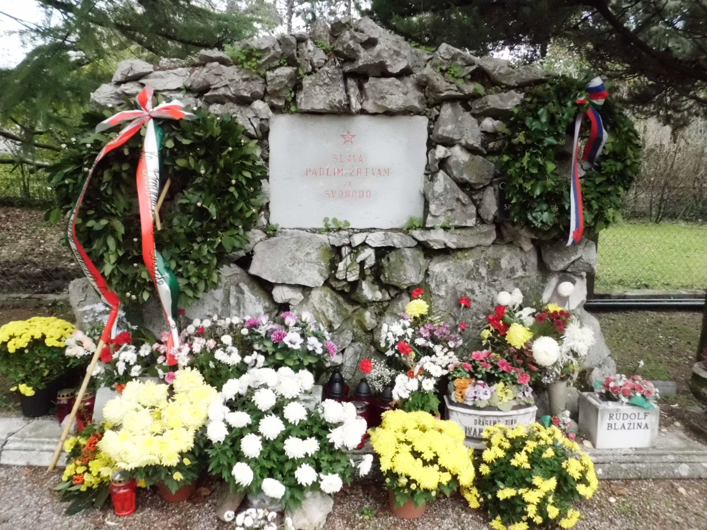 Monumento ai 71 ostaggi fucilati dai nazisti prosso il poligono di tiro di Opicina (TS) il 3/4/1944